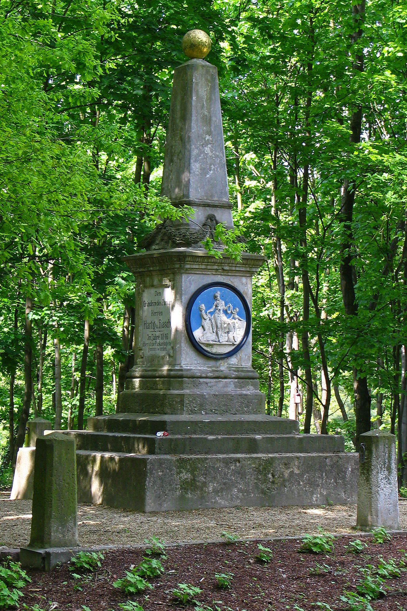 Bad Düben Kurpark (2005) Gründerdenkmal